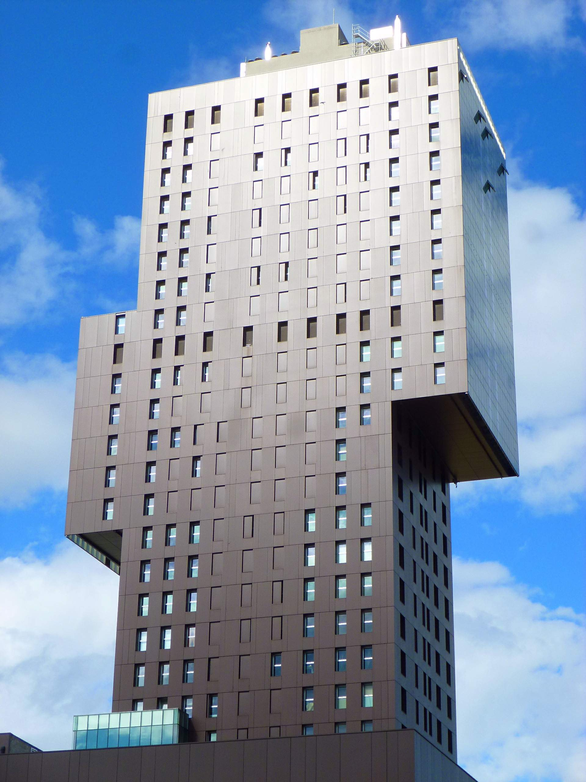 Torre de la Rosaleda (Ponferrada)